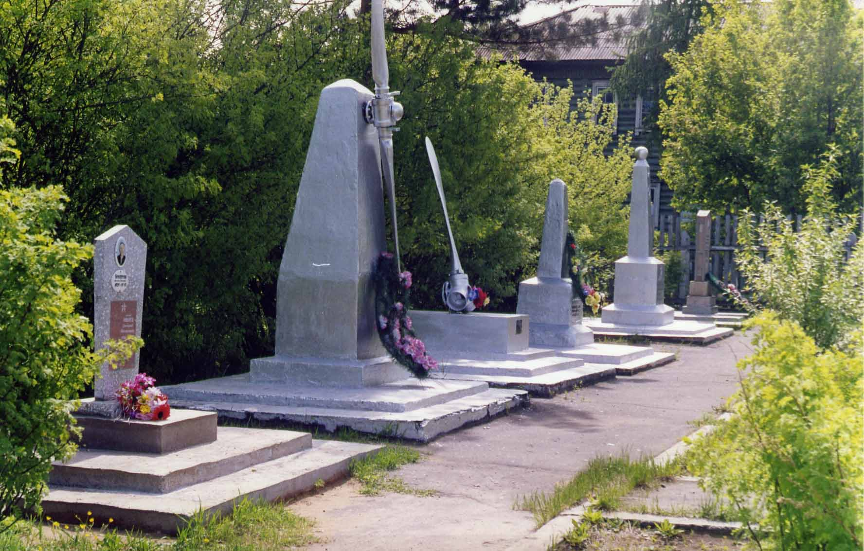 Мемориал героям покорения Севера и лётчикам Алсиба в городском парке города Киренска.